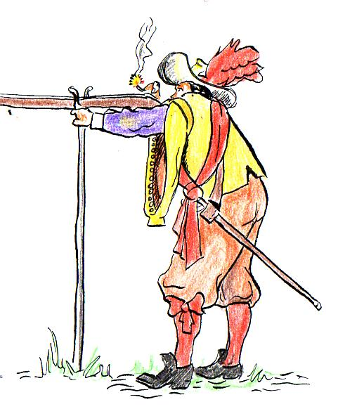 arquebusier d'un tercio vers 1650.